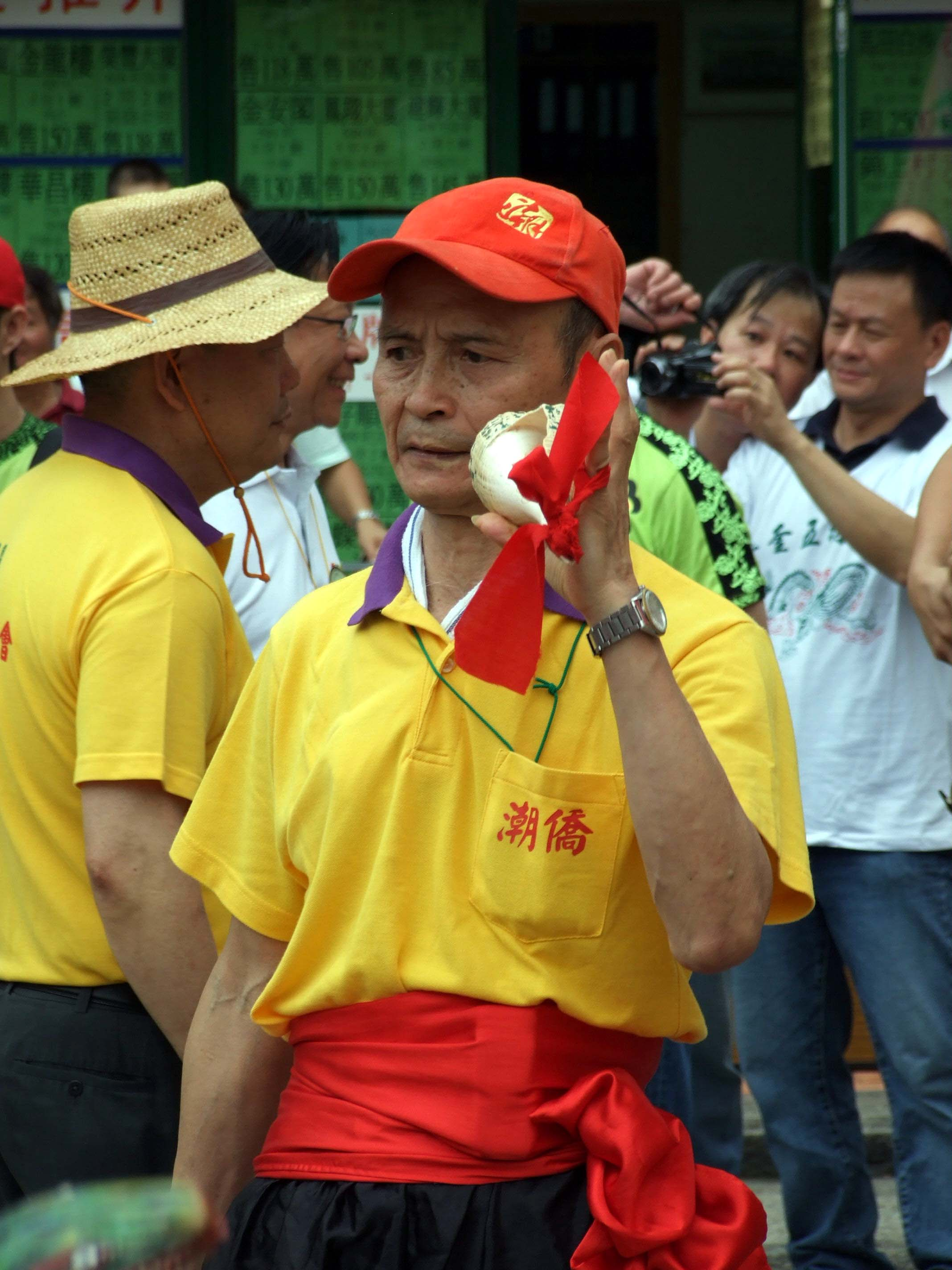 英歌螺号